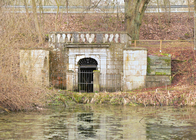 Quellgrotte des Schierpkebach in Langeleben